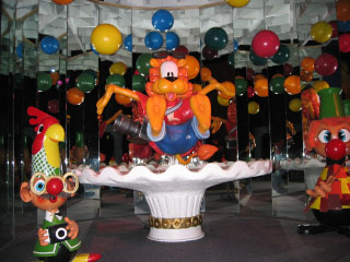 Loeki de Leeuw in de attractie Carnaval Festival in pretpark De Efteling.